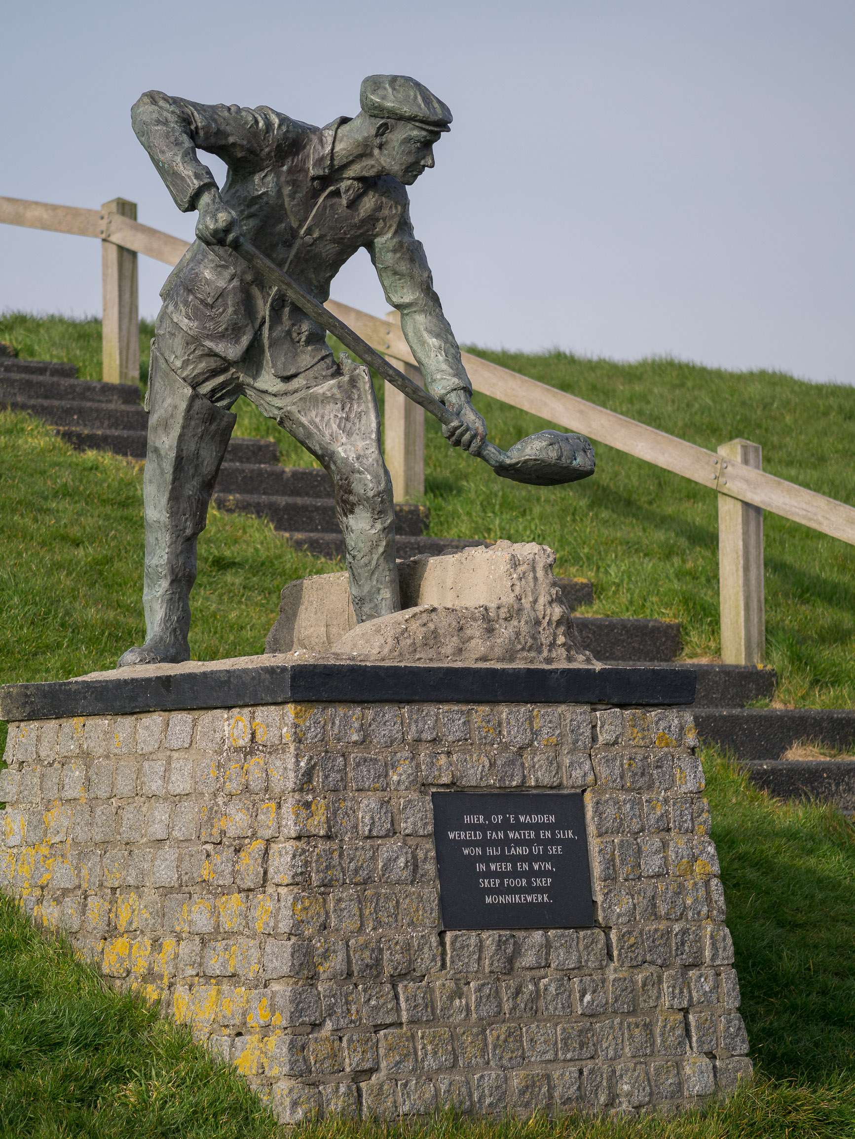 Beeld van de Slik werker op de dijk bij Zwarte Haan